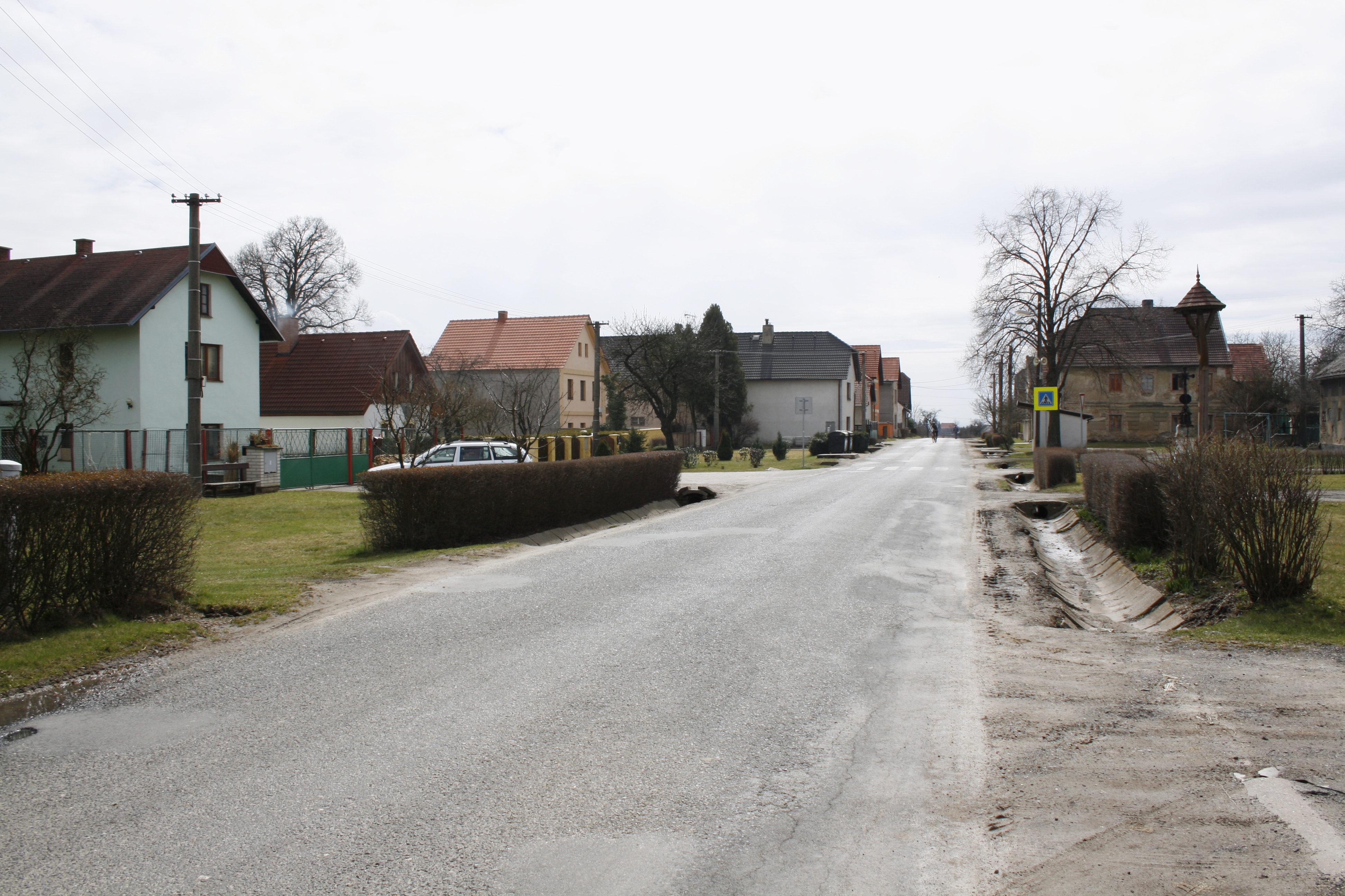 Janova Ves - náves